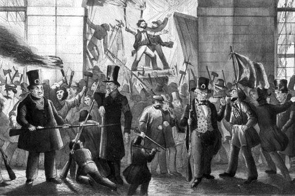 Karikatur zum Sturm auf das Berliner Zeughaus 14. Juni 1848